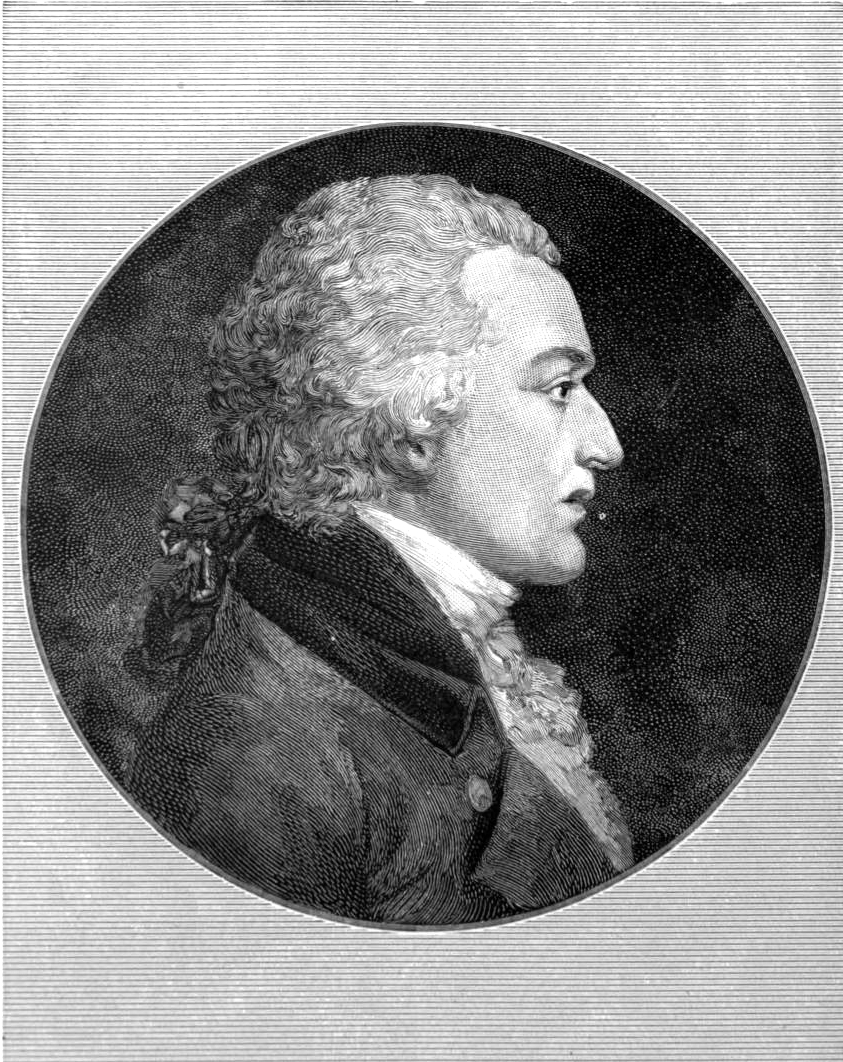 Benjamin Smith Barton